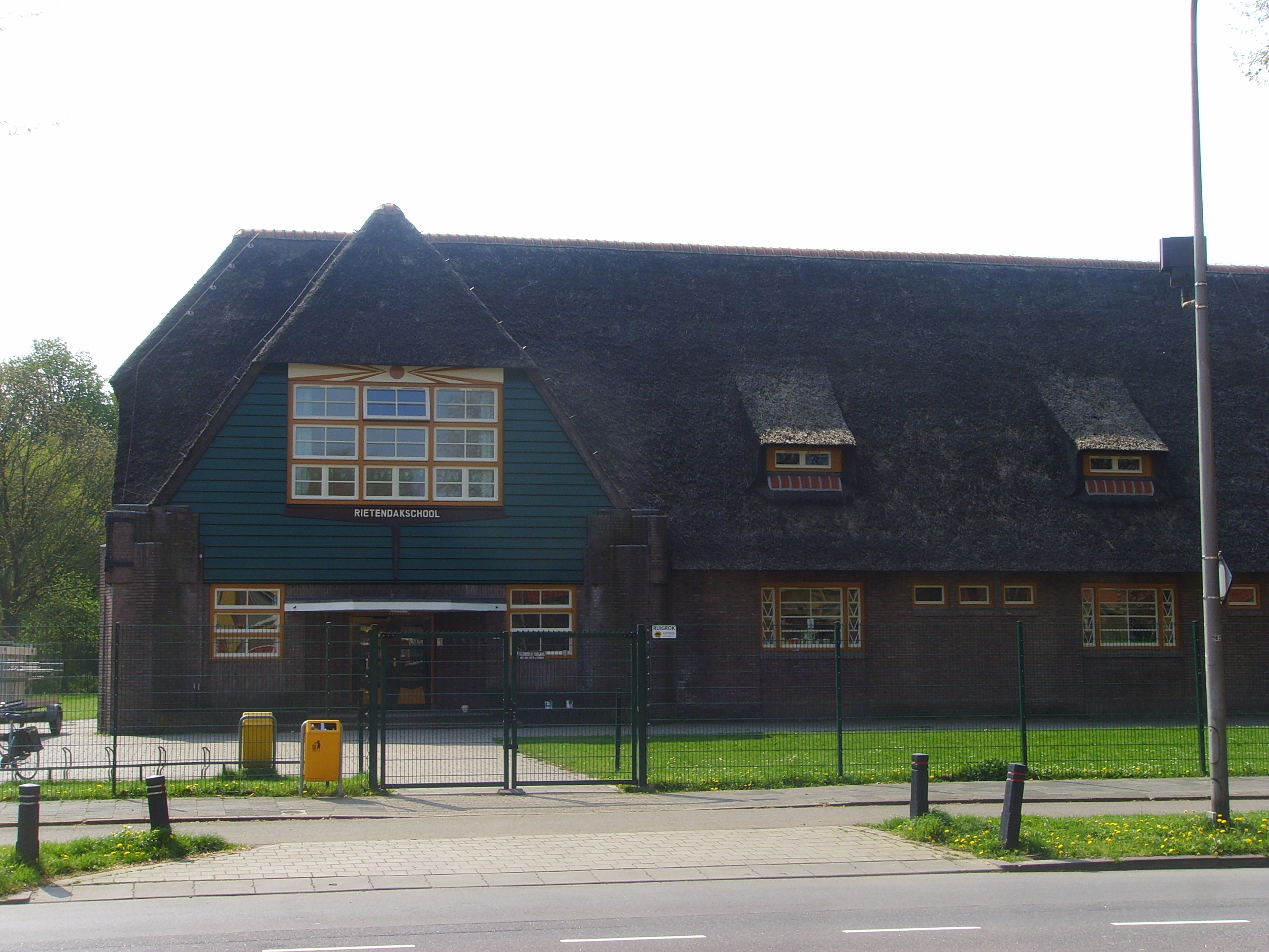 Rietendakschool, Laan van Chartroise 160 Utrecht (NL), architect: Johannes Izak Planjer (1923), opgezet als openluchtschool